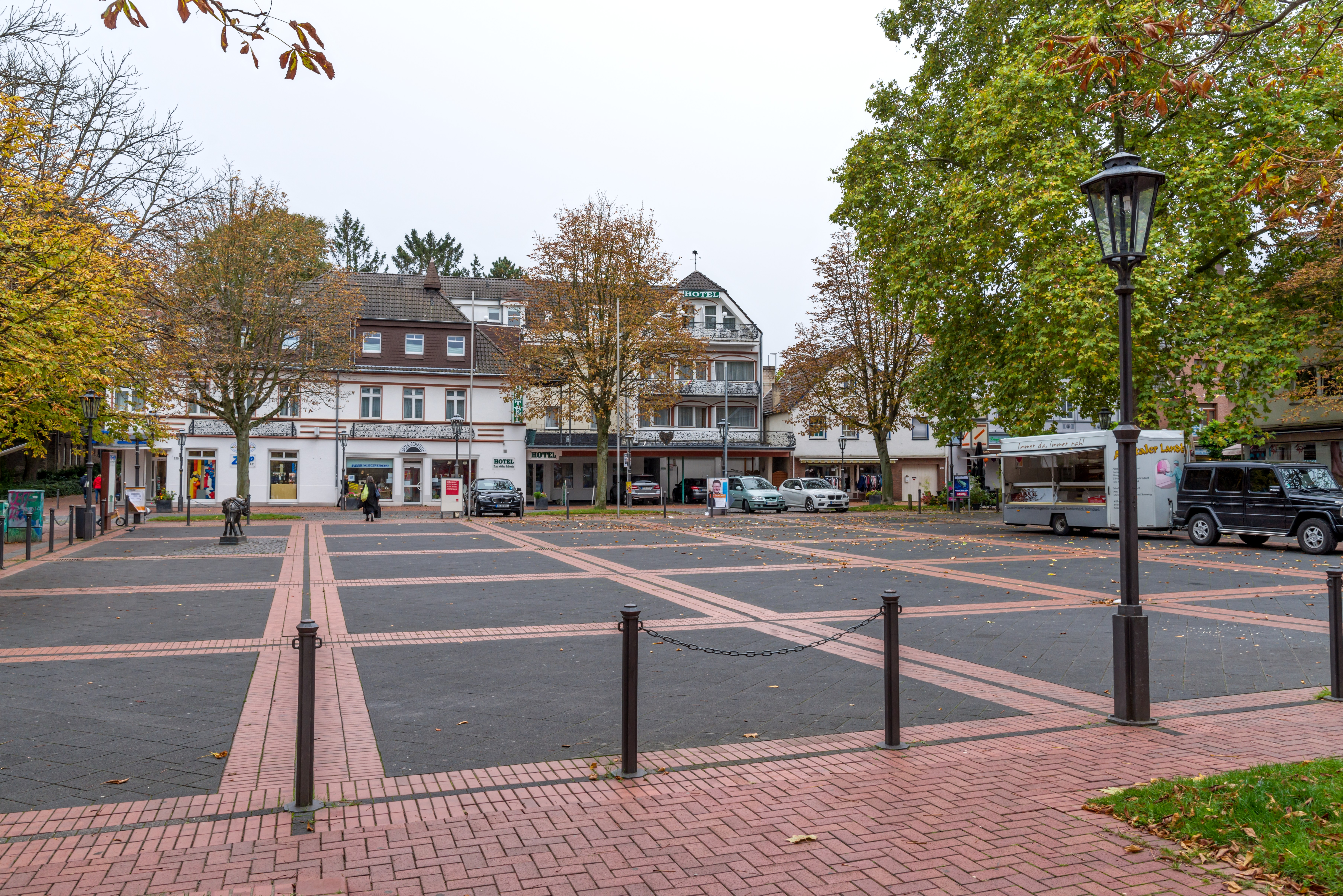 Rochusstraße/Am Schickshof, Bonn-Duisdorf